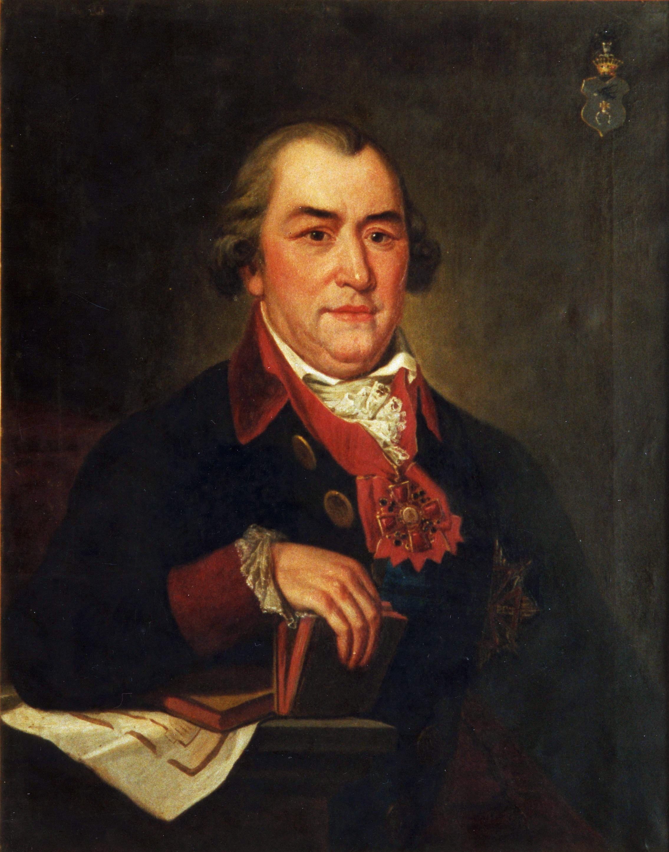 Беларуская (тарашкевіца): Партрэт Міхала Касакоўскага (Michał Kasakoŭski)